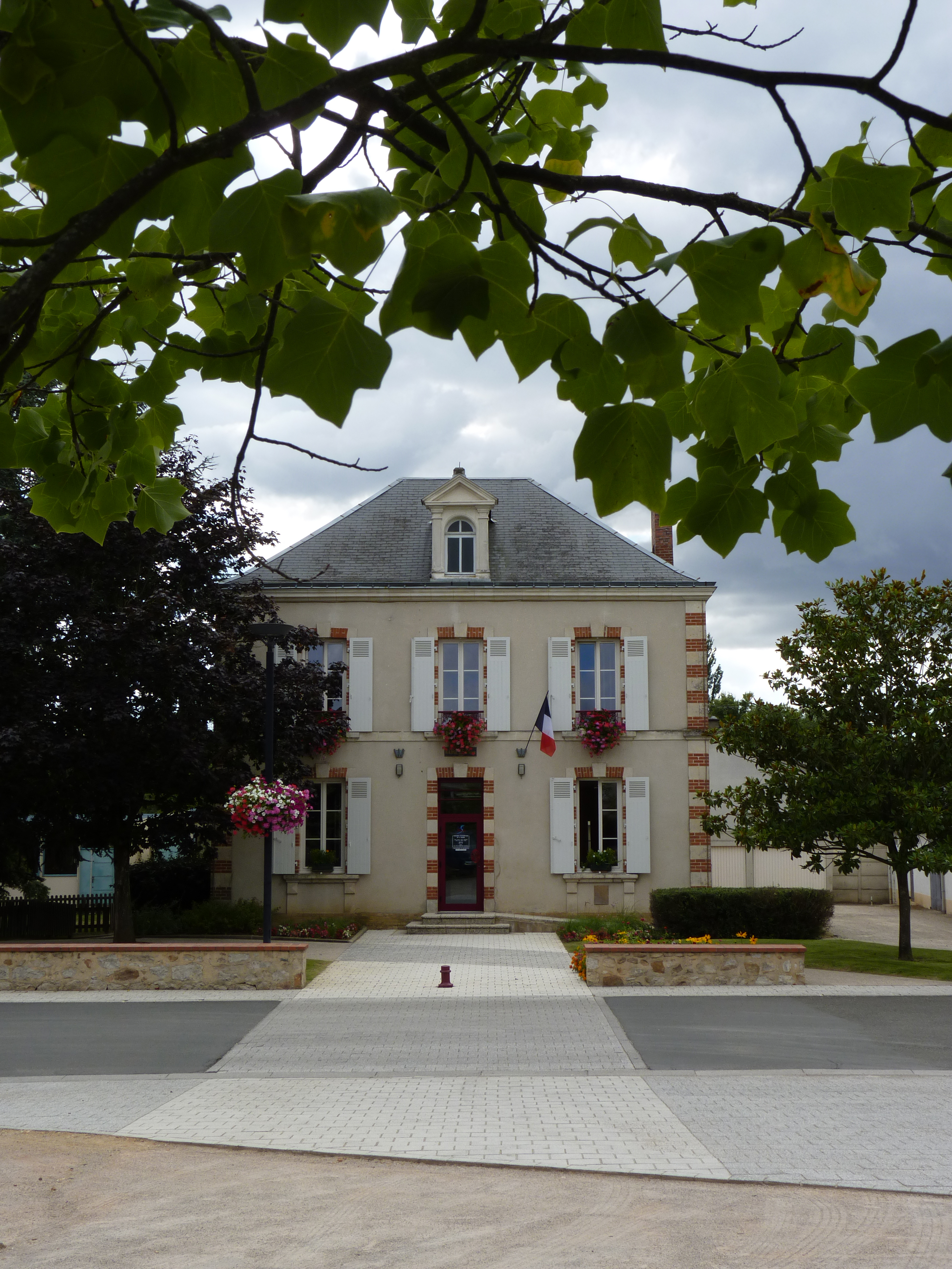 Mairie de Saint Pavace